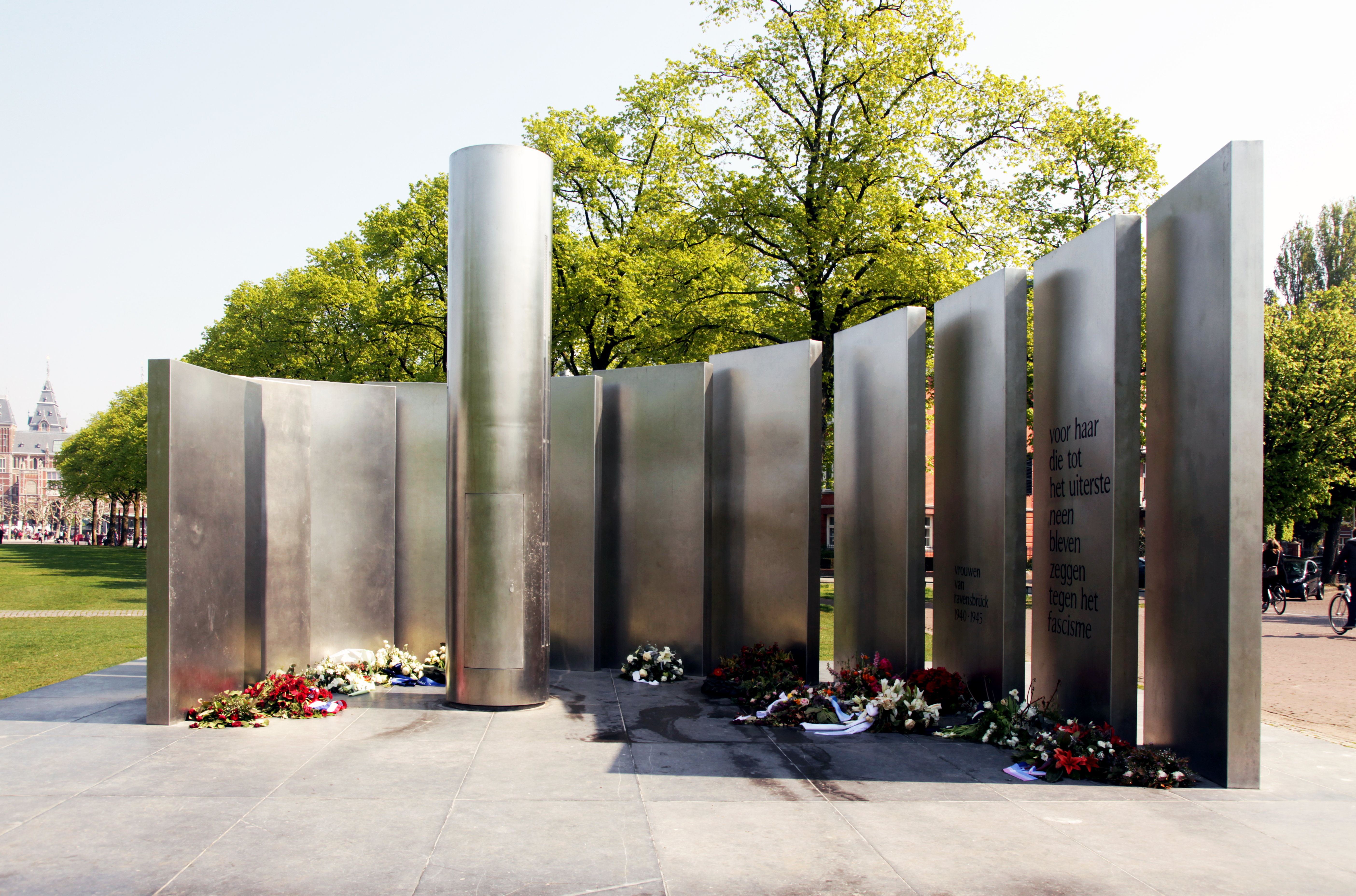 Vrouwen van Ravensbrück 1940-1945